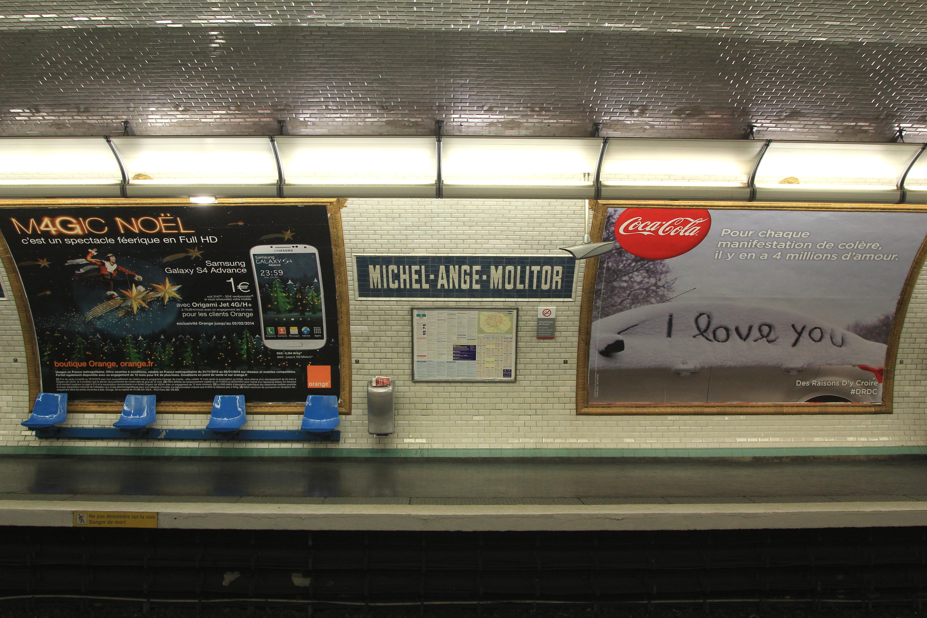 Quai de la station Michel-Ange - Molitor de la ligne 9 du métro parisien, direction Pont de Sèvres.